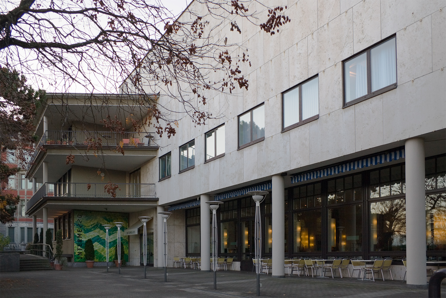 Seeseite des Kongresshauses Zürich, SchweizArchitekten Häfeli Moser Steiger